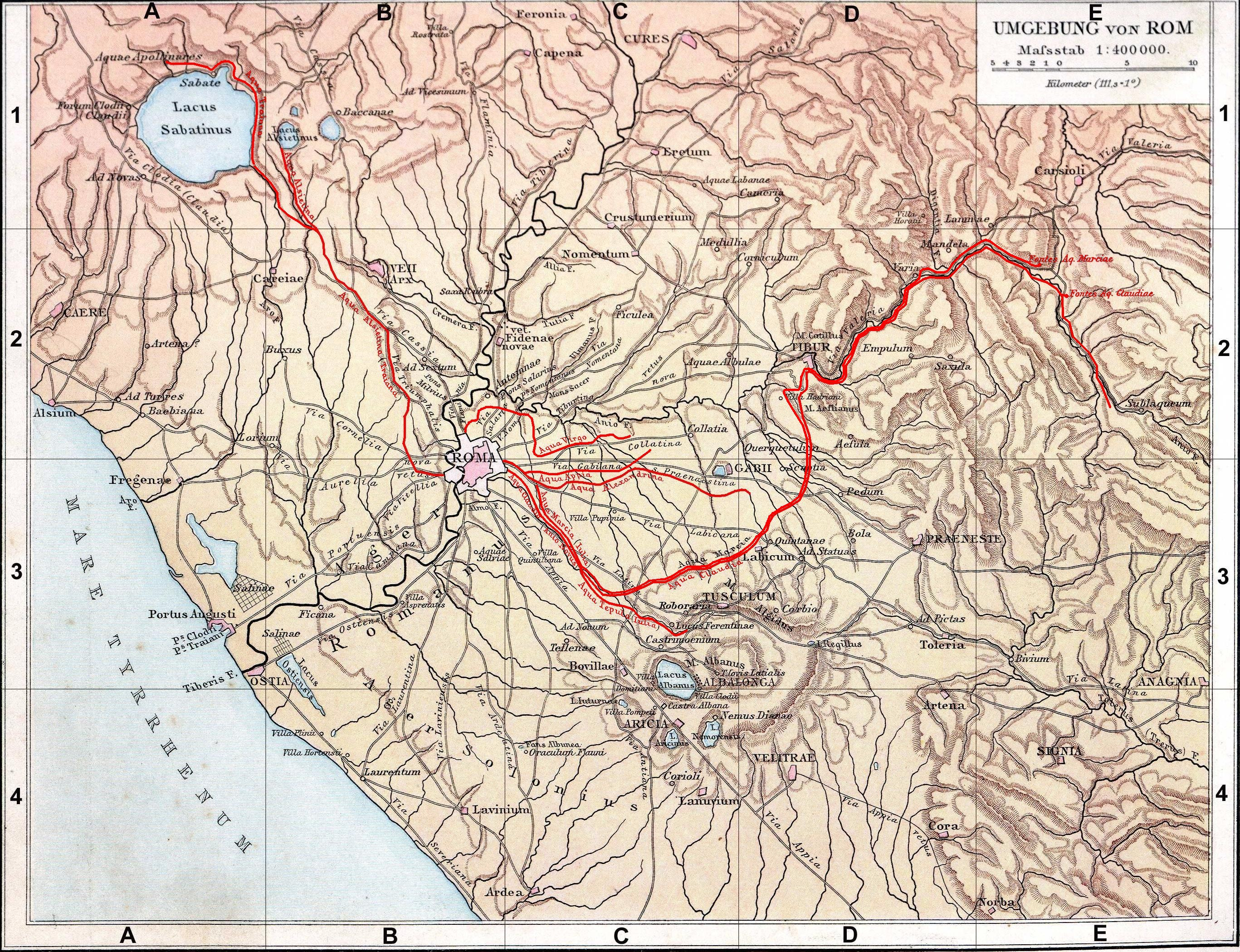 Fond de carte de 1886 (G. Droysens Allgemeiner Historischer Handatlas), libre de droit (Image:Rom_Umgebung.jpg), avec l'aqua Alexandrina en rouge.